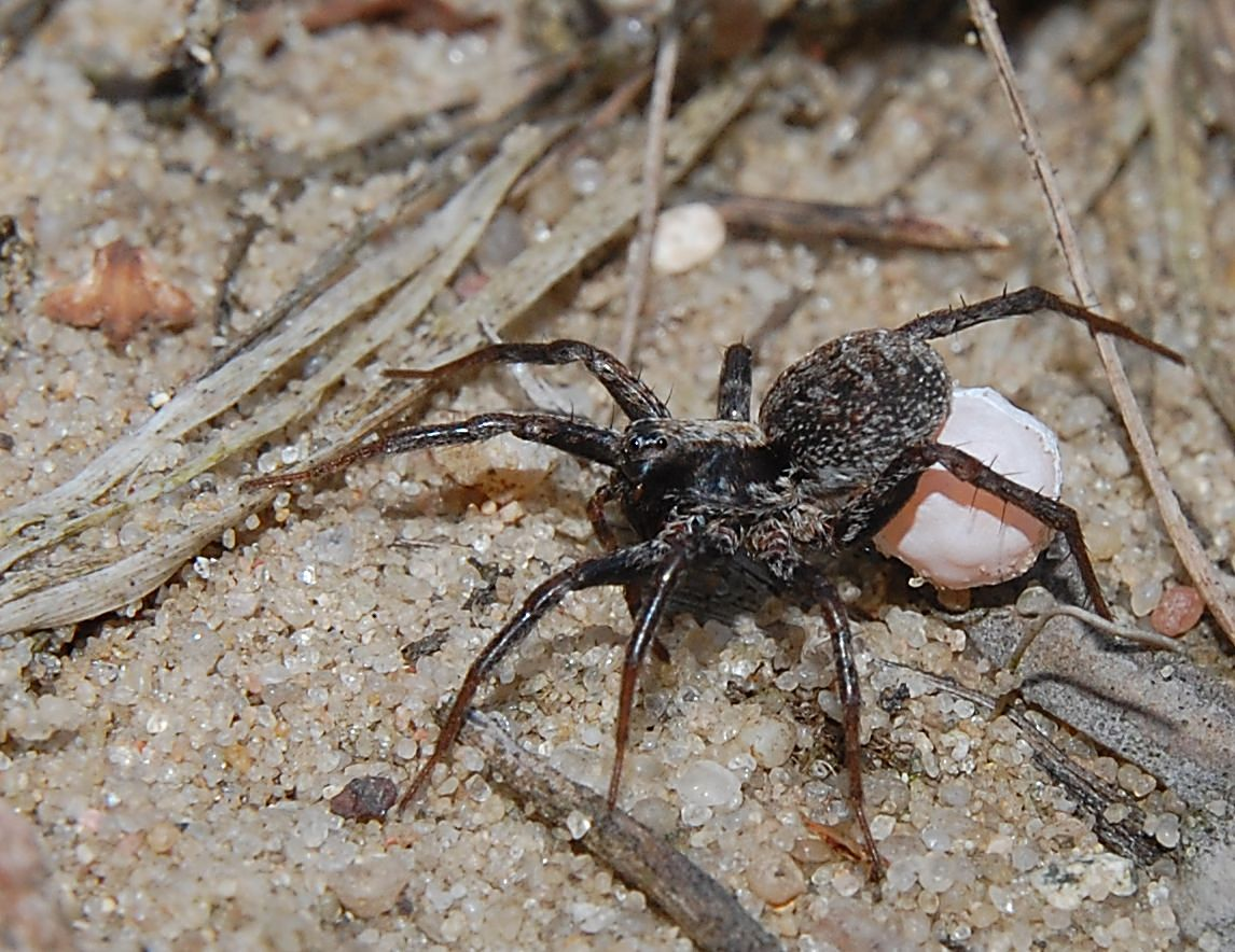 Xerolycosa miniata, female with eggsack; leg. R. Altenkamp, det. K.-H. Kielhorn, Berlin